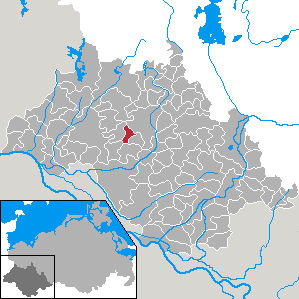 Toddin in Mecklenburg-Vorpommern - district Ludwigslust